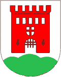 Wappen von Niederburg